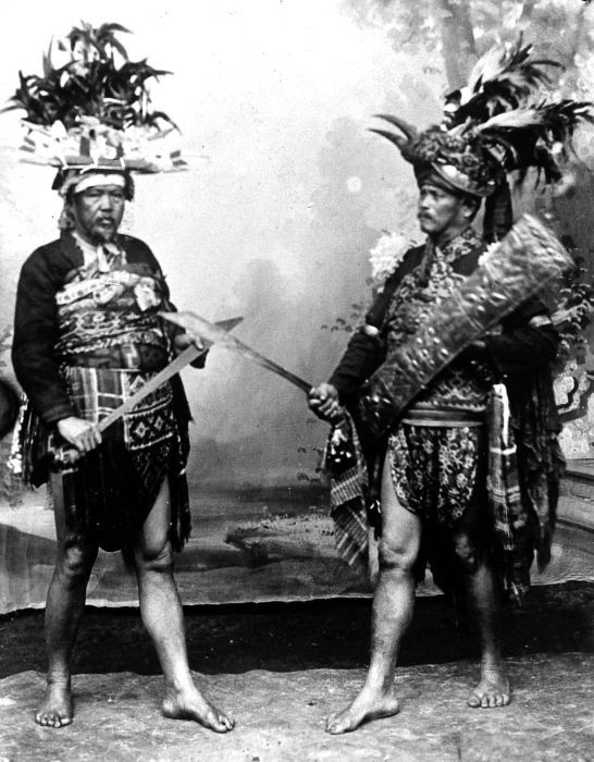 Repronegatief. Oude krijgskleding van de Minahasa van Celebes